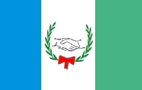 Bandera del municipio Benitez, estado Sucre, Venezuela